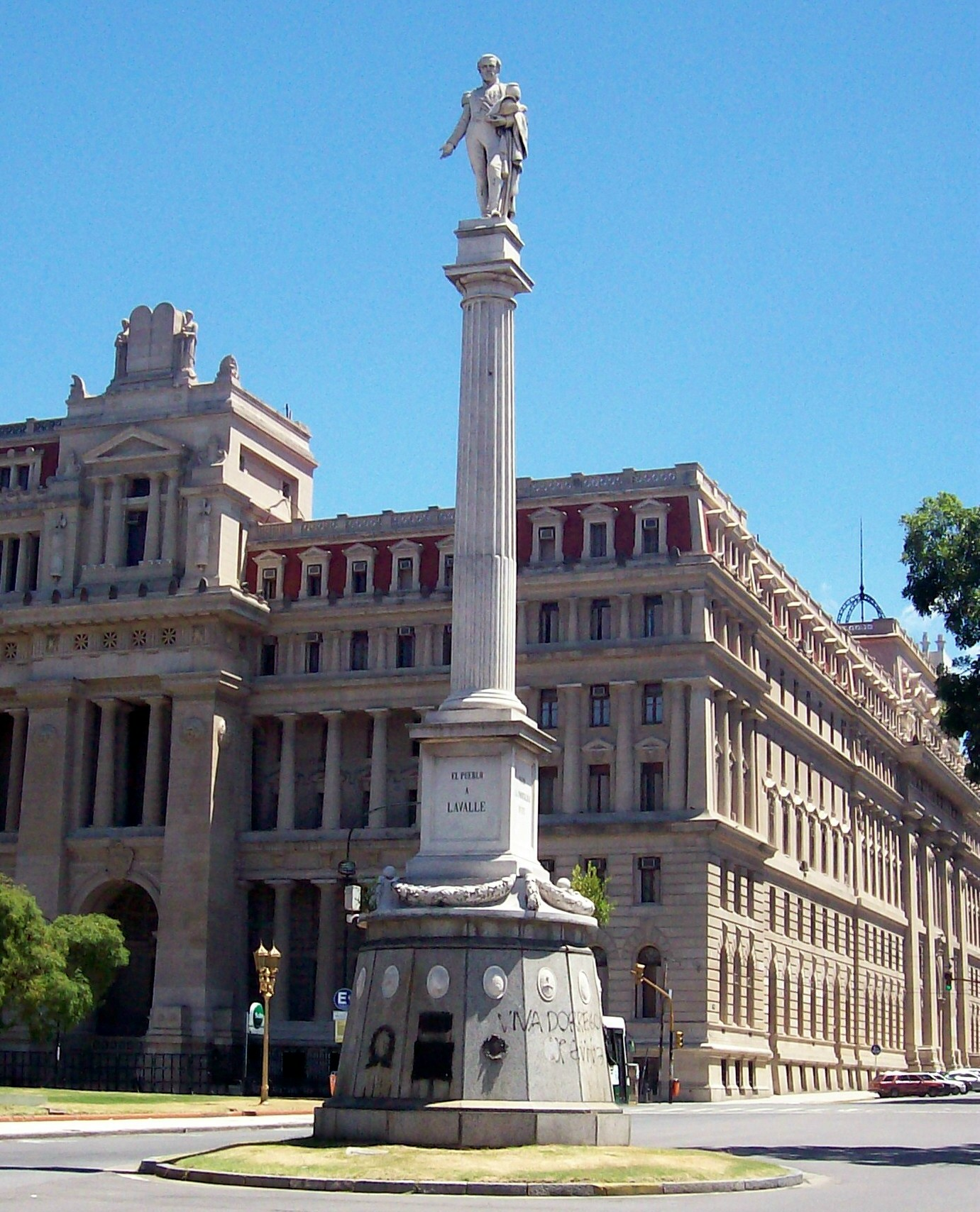 Columna en memoria de Juan Lavalle, obra del artista italiano Pietro Costa. Plaza Lavalle, Buenos Aires, Argentina.